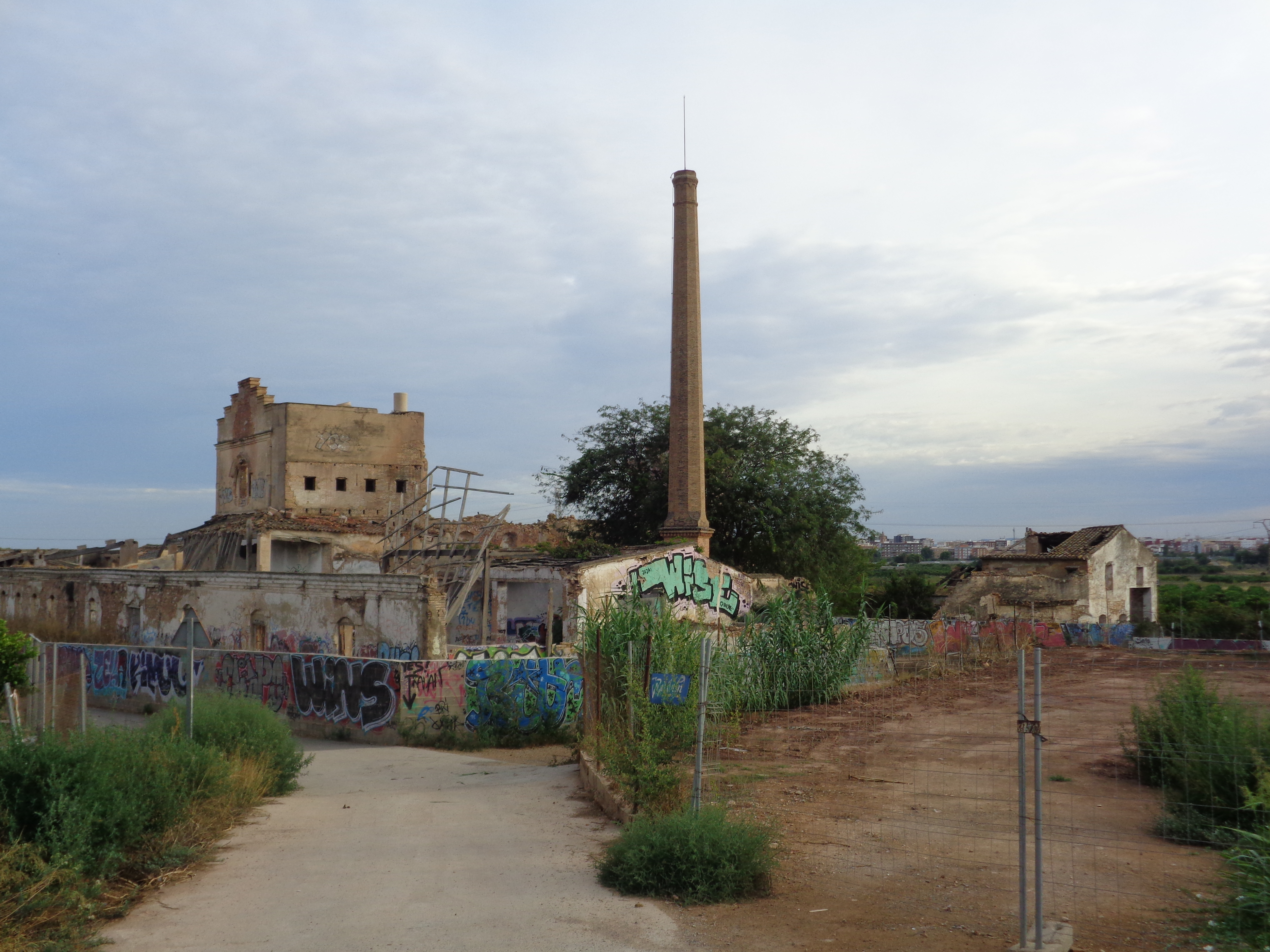 Paterna.